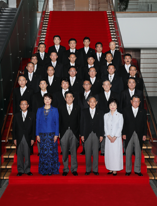 Shinzō Abe, Prime Minister, posed for the photo with Yoshihide Suga, Chief Cabinet Secretary, Yasutoshi Nishimura, Kōtarō Nogami, Kazuhiro Sugita, Deputy Chief Cabinet Secretaries, Tōru Doi, Hiroaki Nagasawa, Takao Ochi, Mineyuki Fukuda, Fumiaki Matsumoto, Shinsuke Okuno, Manabu Sakai, Yasuhiro Hanashi, Kazuyuki Nakane, Masahisa Satō, Ken'ichirō Ueno, Minoru Kihara, Hideki Niwa, Toshiei Mizuochi, Michiyo Takagi, Hideki Makihara, Yōsuke Isozaki, Masaaki Taniai, Kōsaburō Nishime, Yōji Mutō, Takao Makino, Tsukasa Akimoto, Naomi Tokashiki, Tadahiko Itō and Tomohiro Yamamoto, Senior Vice-Ministers, at the Prime Minister's Official Residence in Chiyoda Ward, Tōkyō Metropolis on August 7, 2017.